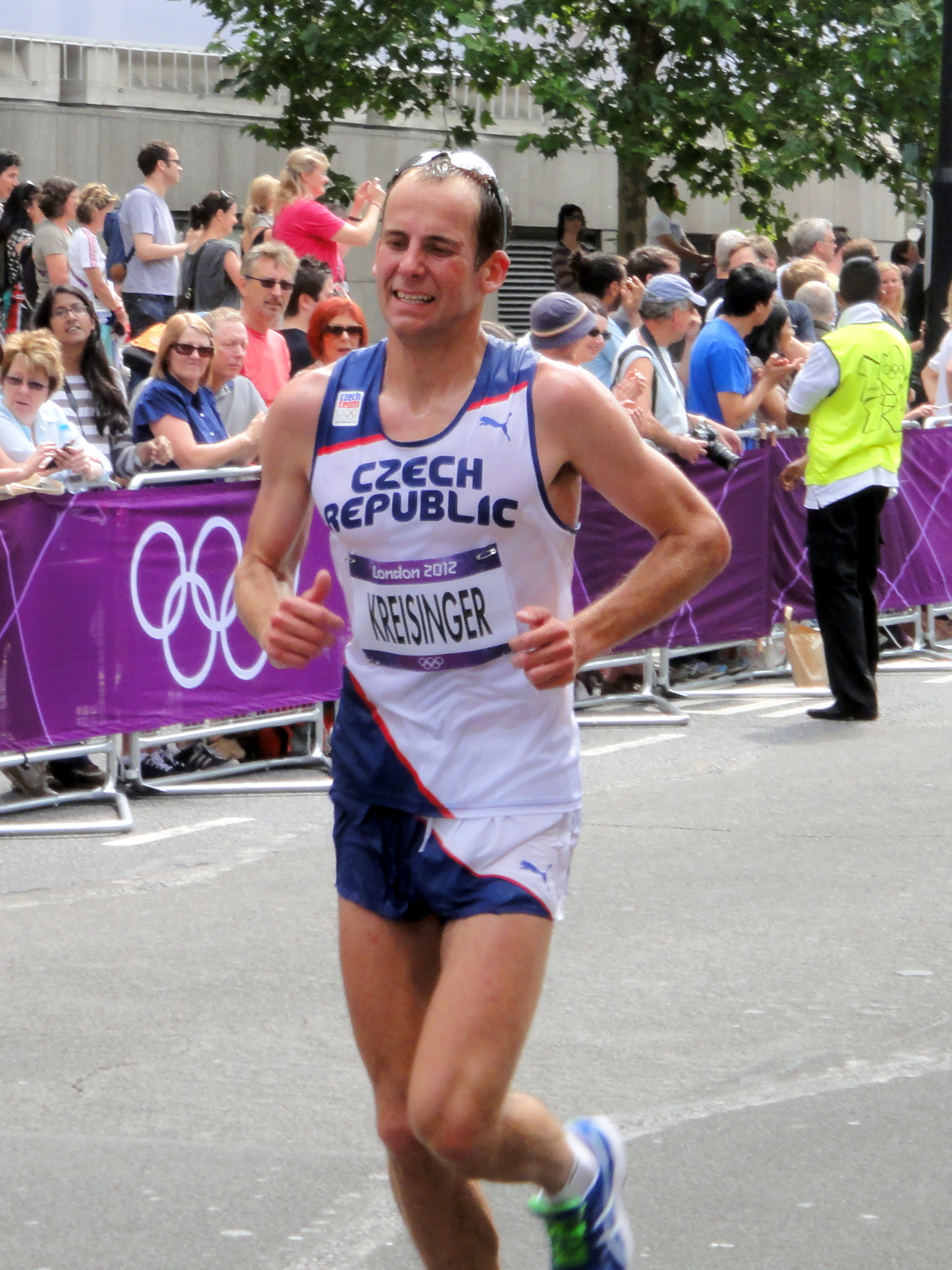 Jan Kreisinger (Czech Republic) - London 2012 Men's Marathon